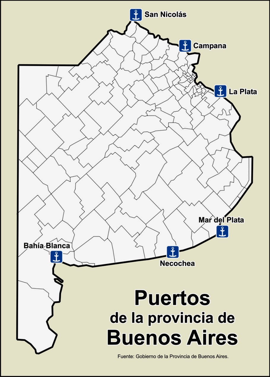 Puertos de la provincia de Buenos Aires, Argentina.